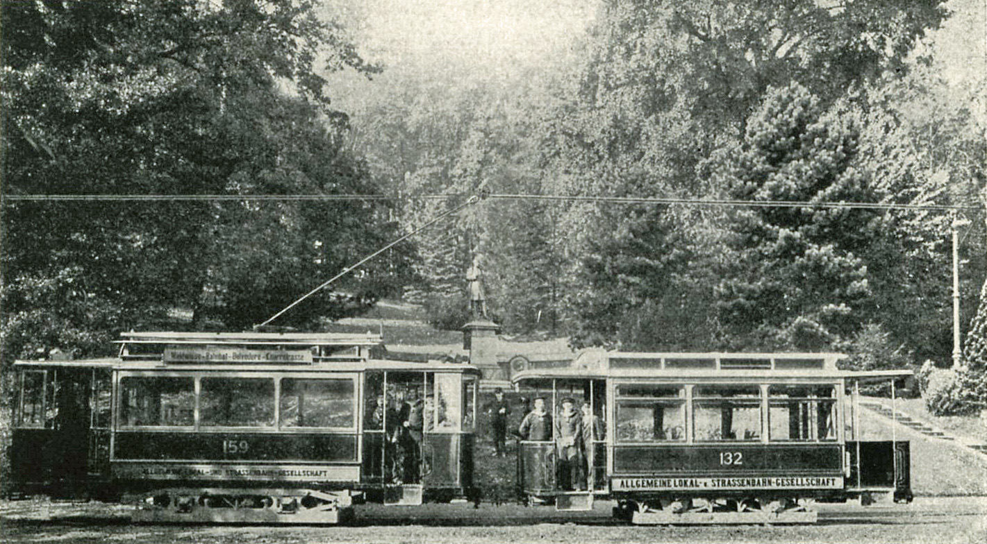 Elektrische Straßenbahn in Kiel (Eigentümer: Allgemeine Lokal- und Straßenbahn-Gesellschaft, Berlin)